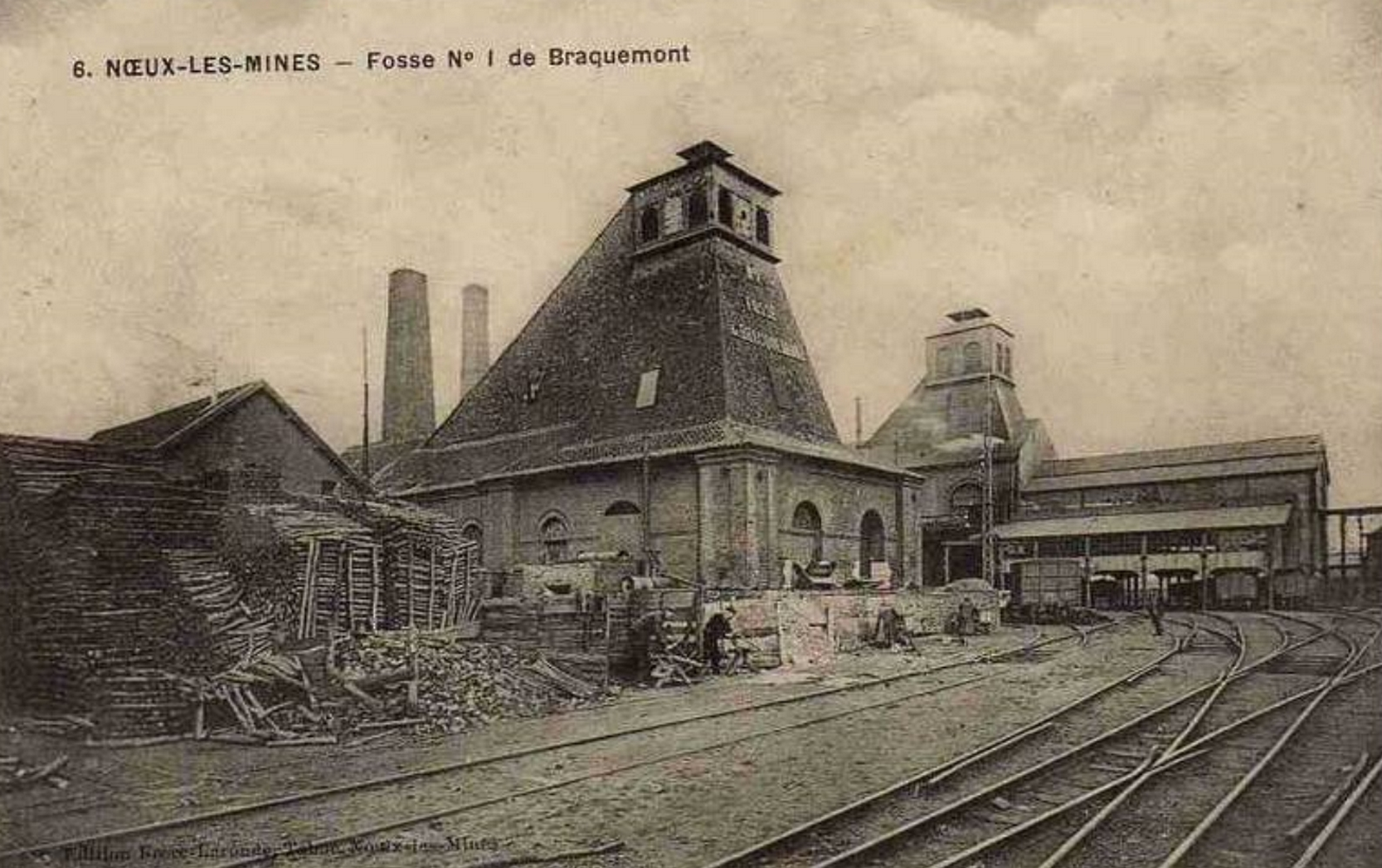 Fosse n° 1 - 1 bis de la Compagnie des mines de Nœux, Nœux-les-Mines, Pas-de-Calais, Nord-Pas-de-Calais, France.